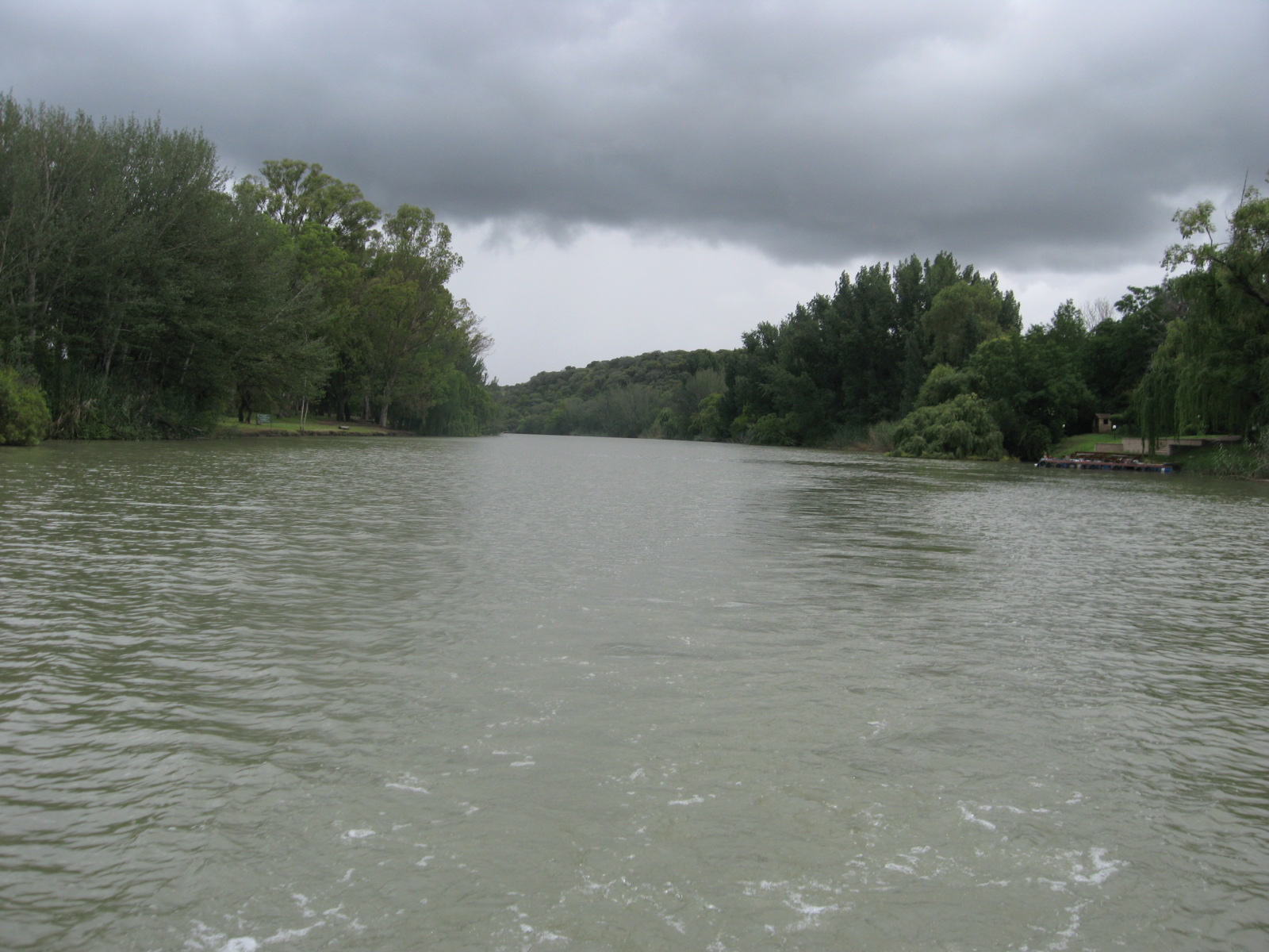 Maselspoort